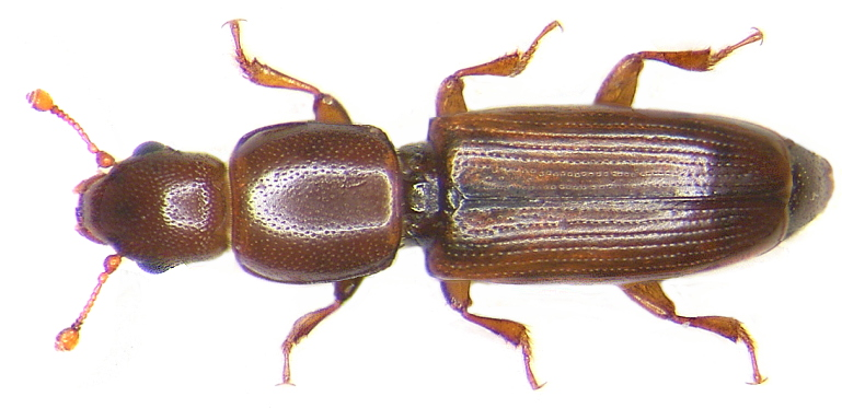 Rhizophagus depressus (Fabricius, 1792). Familie: Monotomidae Grösse: 2,8-4 mm Verbreitung: Europa Ökologie: unter Nadelholzrinde Fundort: Germania, Oberfranken, Kulmbach leg.det. U.Schmidt, 1984 Foto: U.Schmidt, 2006